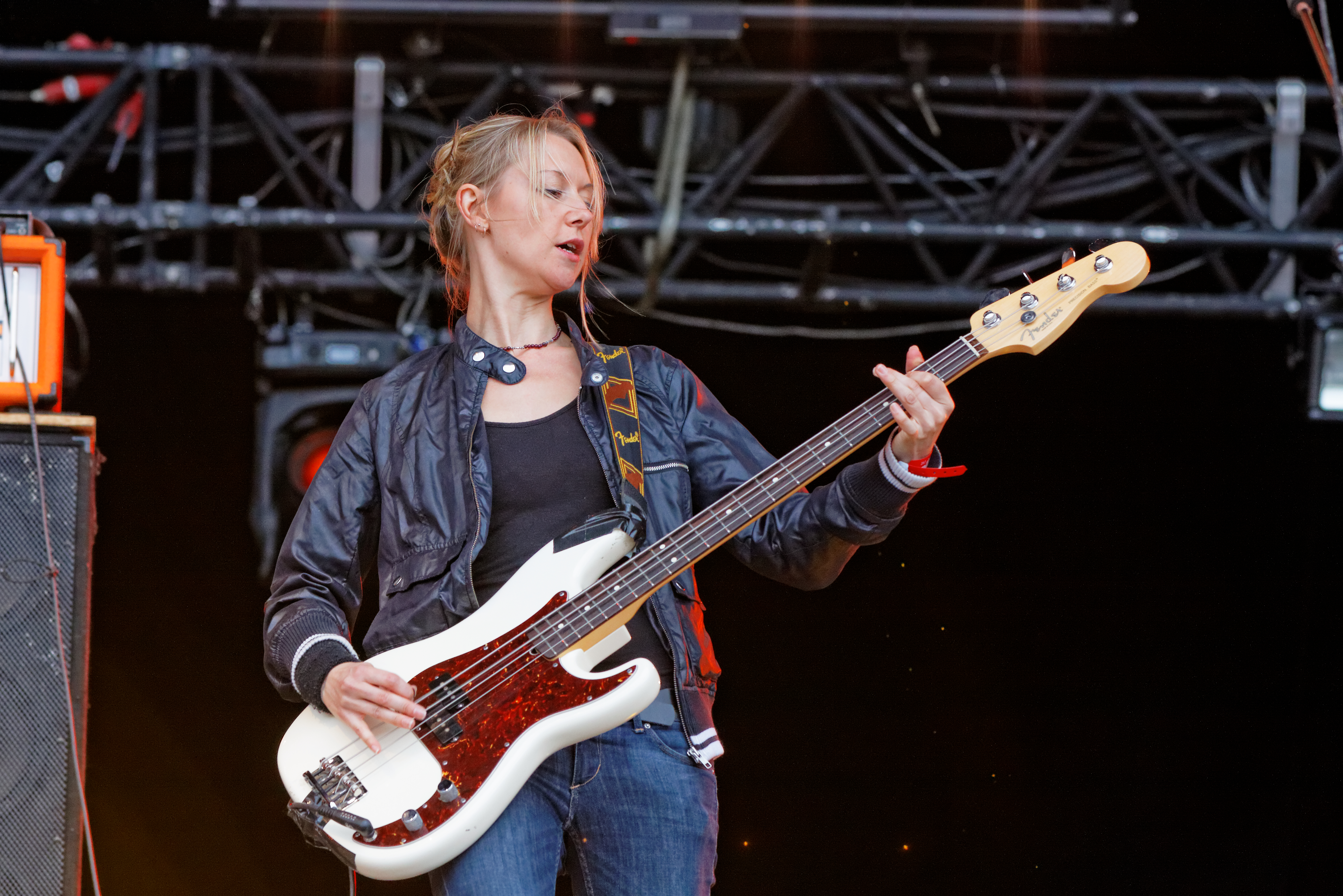 Future of the Left en concert sur la grande scène lors de la fête de l'Humanité 2012.